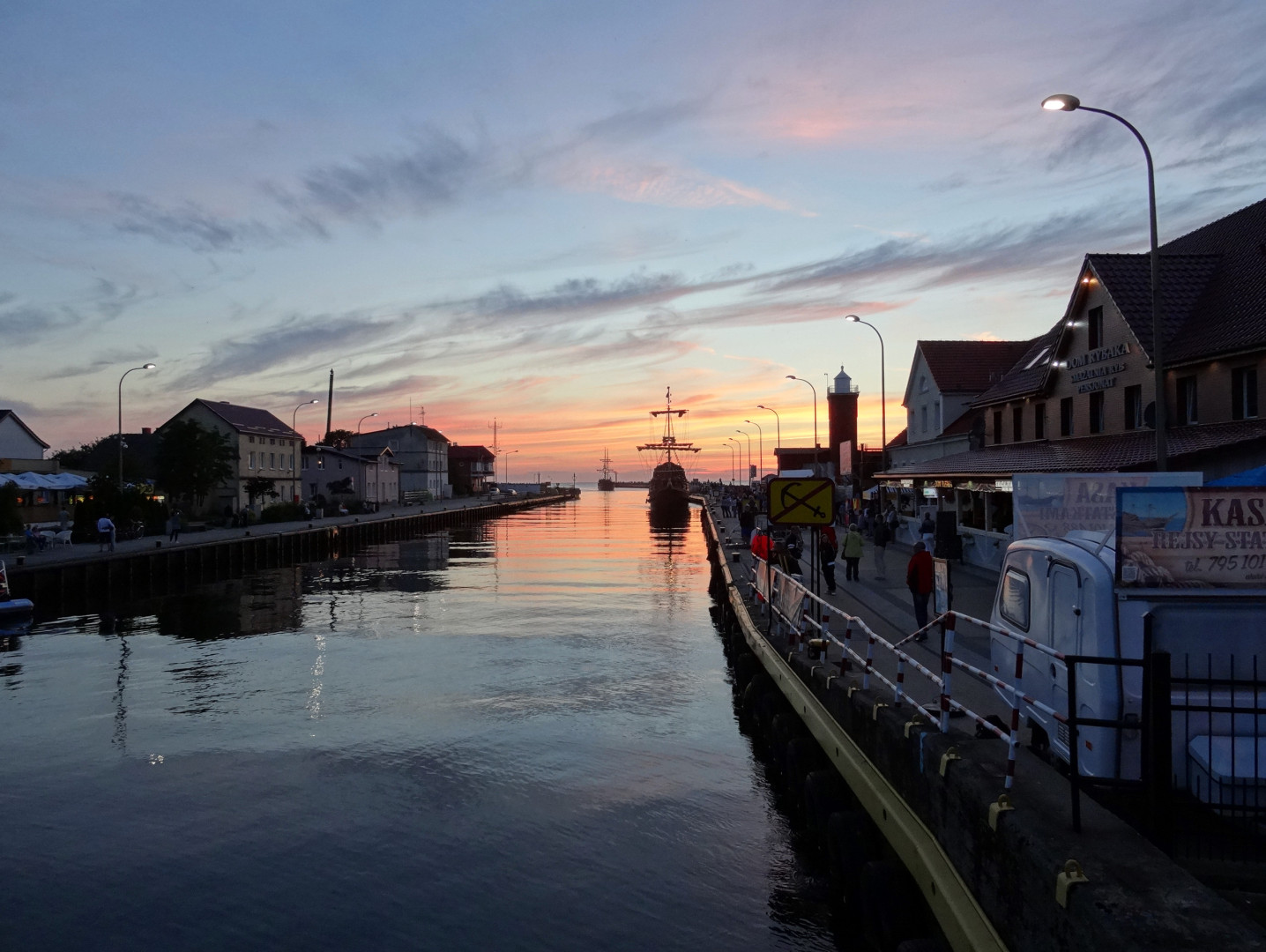 Port w Darłowie, rzeka Wieprza